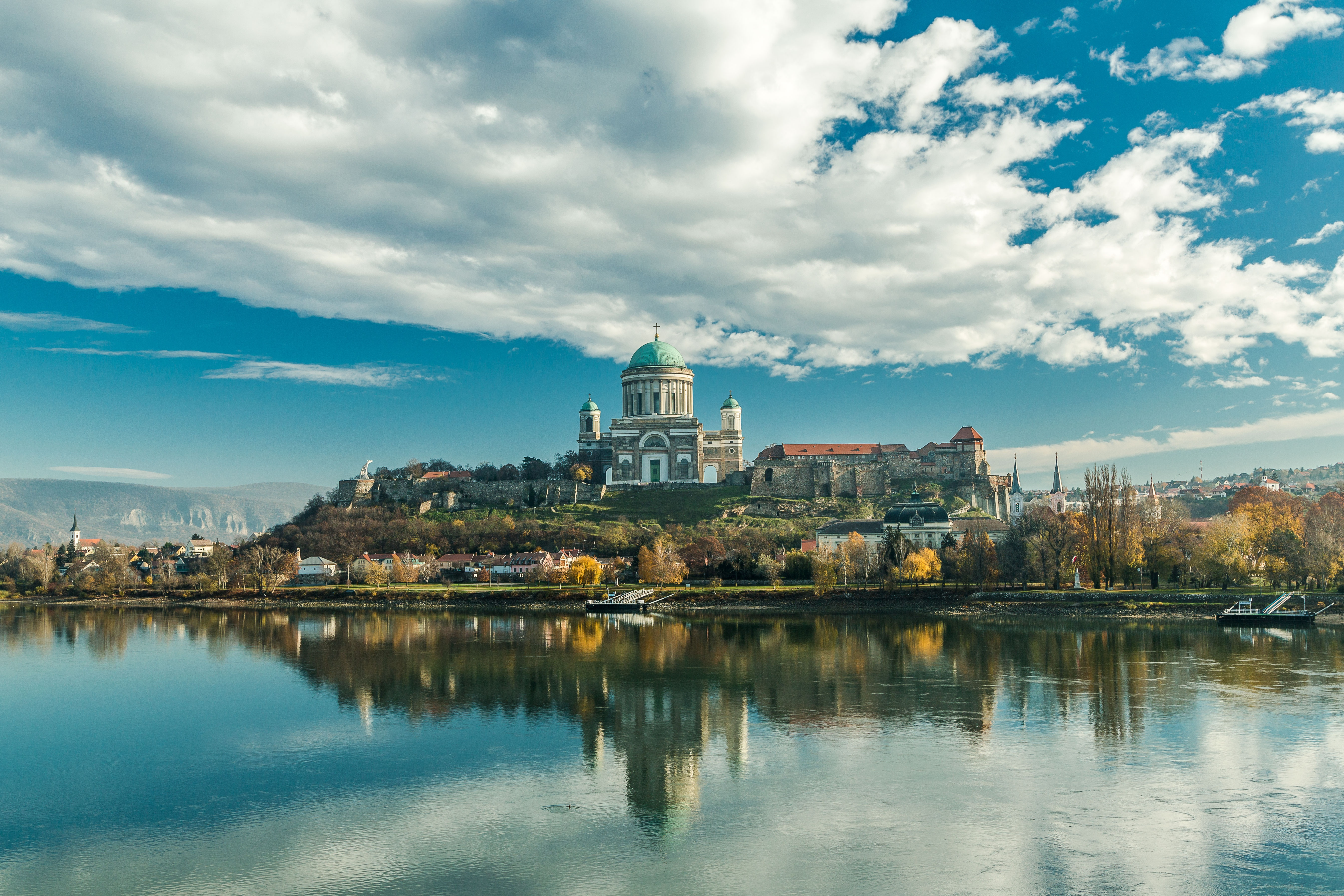 Az esztergomi bazilika panorámája